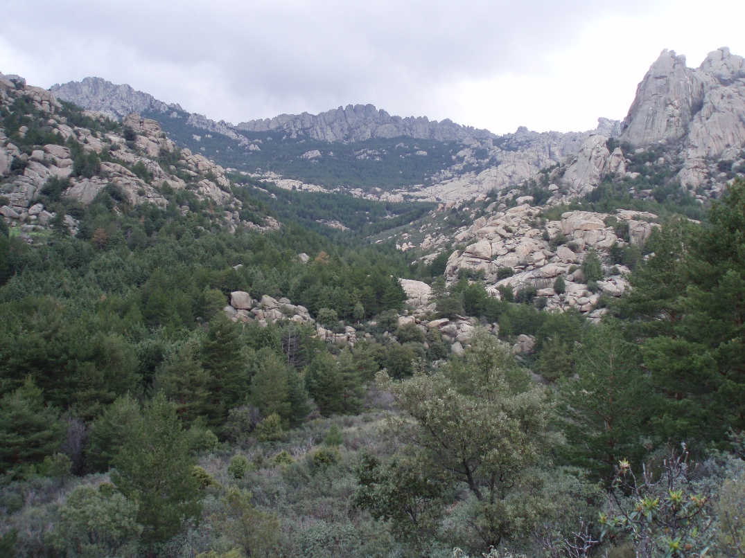 Circo de la Pedriza Posterior (Comunidad de Madrid, España).